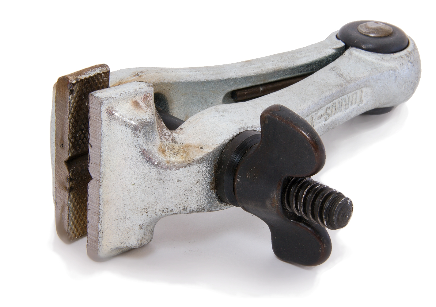 Česky: zámečnická svorka